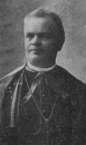 Jan Křtitel Marek (1847-1913), český římskokatolický kněz a kanovník Metropolitní kapituly u sv. Víta v Praze